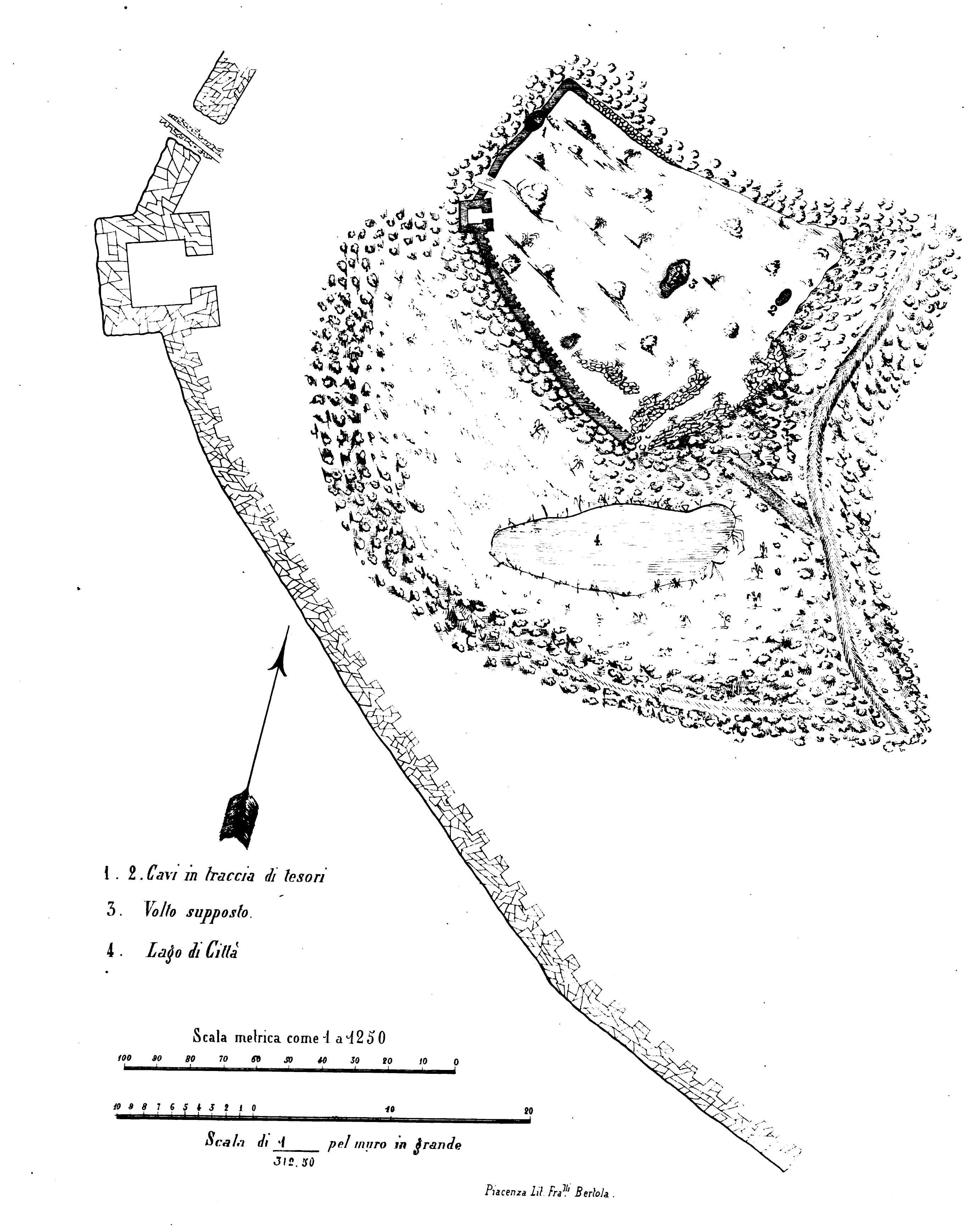 Mappa di Città d'Ombria tracciata nel 1864 da Bernardo Pallastrelli nel testo "La città d'Umbria nell'Appennino Piacentino"